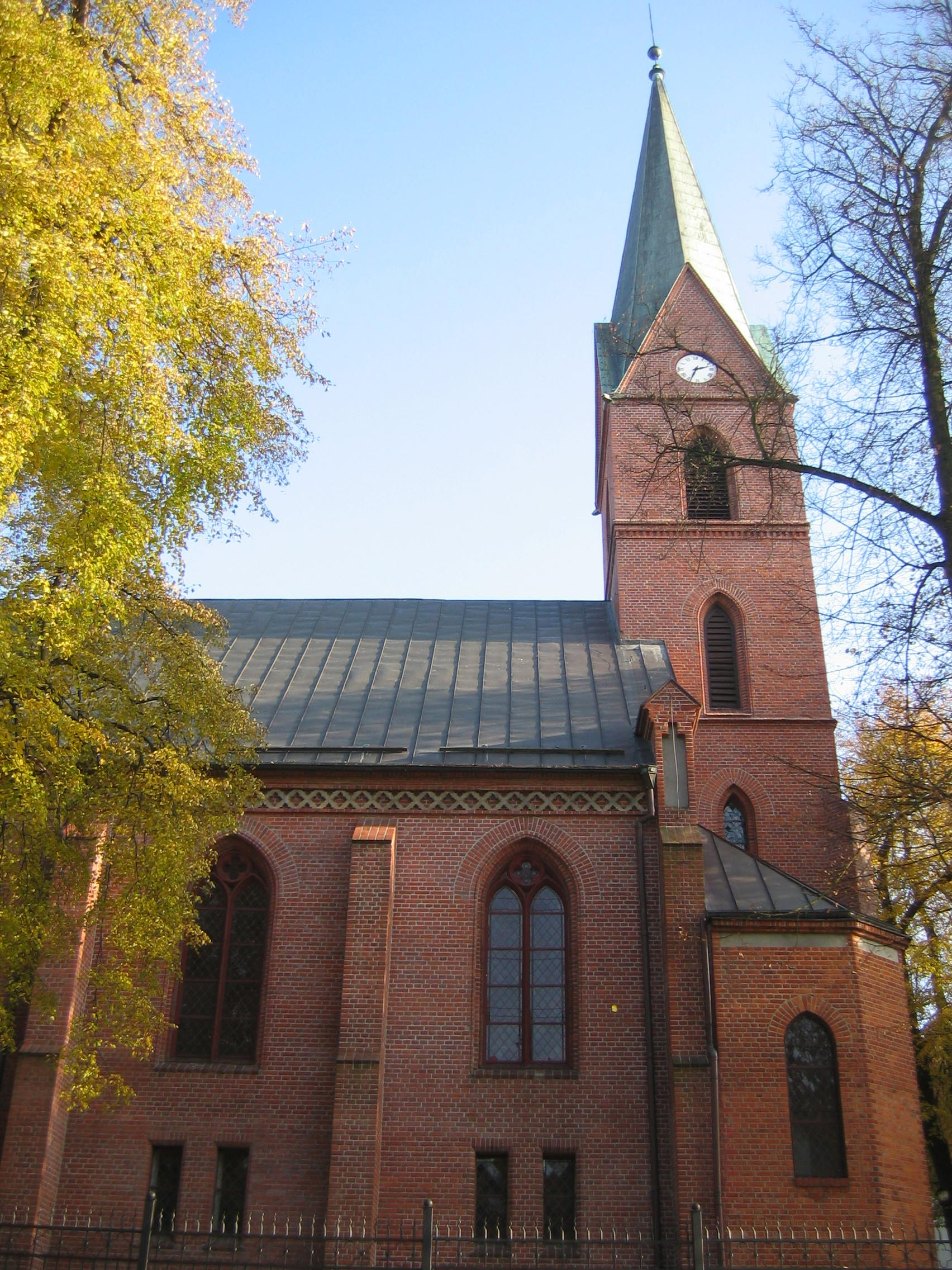 zrobione 27.10.2007